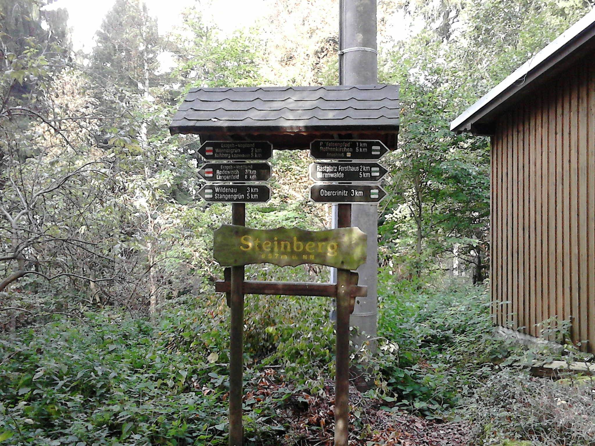 Wanderwegweiser mit Höhenangabe auf dem Steinberg bei Rothenkirchen / Wernesgrün. Gemeinde Steinberg, Sachsen, Deutschland.